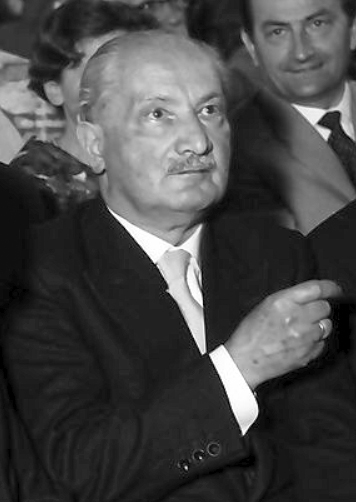 Photograph of Martin Heidegger. Detail of a phototograph entitled : "W 134 Nr. 060678b - Hausen: Festakt, in der Reihe, Kultusminister Storz, Prof. Heidegger, Dichtel". Additional reference : Teilbestand W 134 (Neg. BaWü), Teil 1 - Fotosammlung Willy Pragher: Filmnegative Baden-Württemberg, Teil 1.